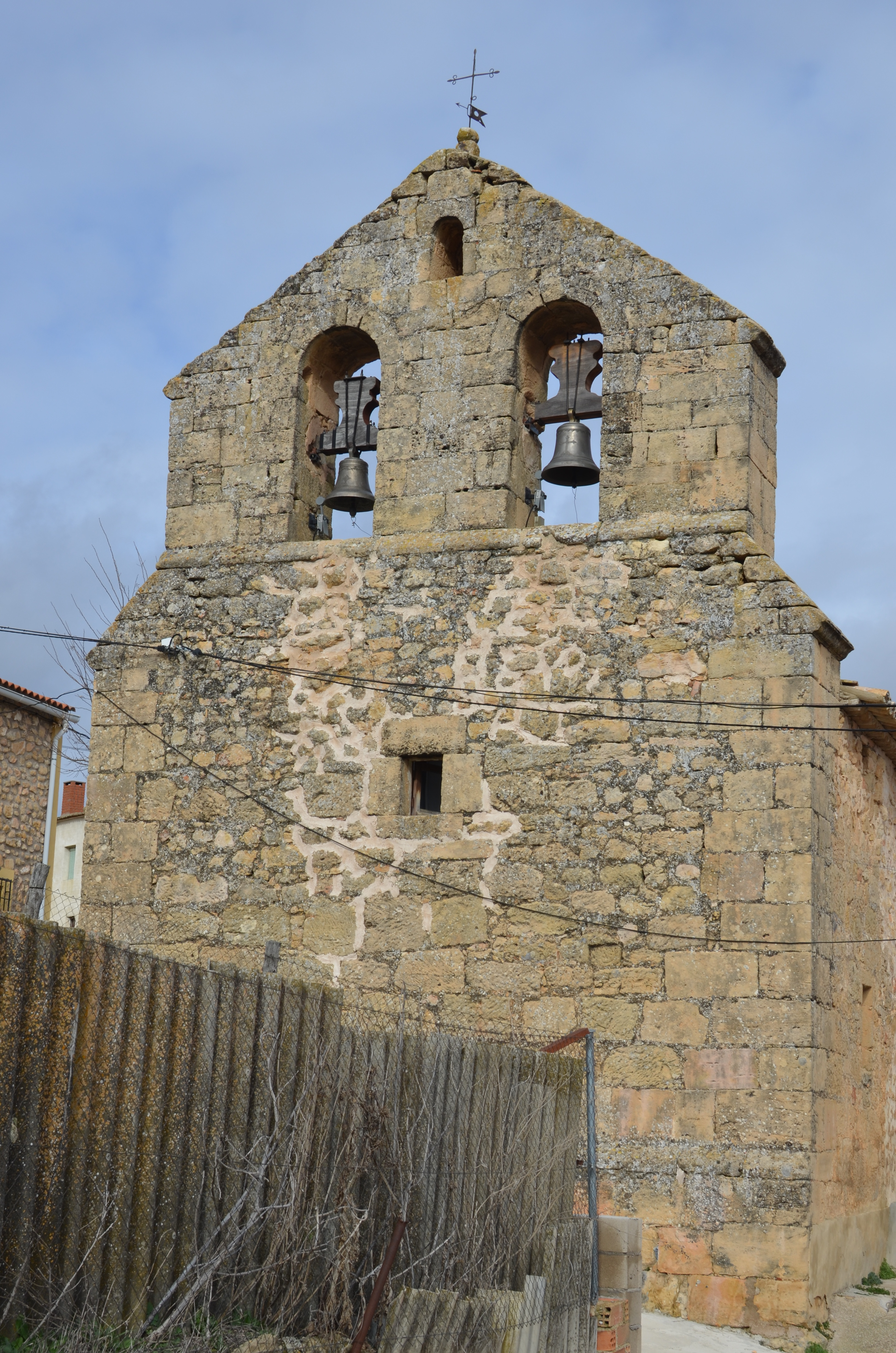 Iglesia de San Lorenzo mártir